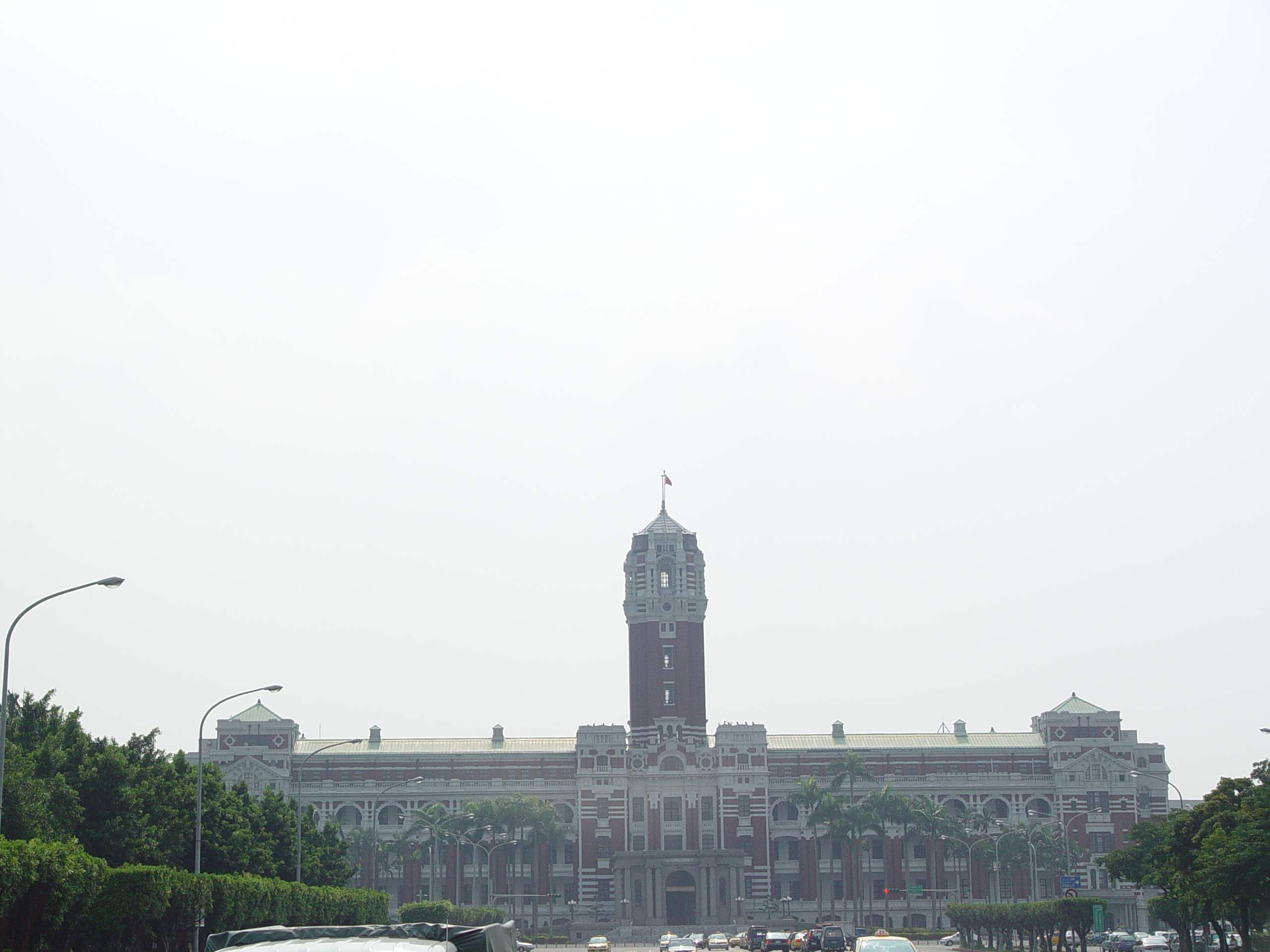 中華民國台北市總統府。